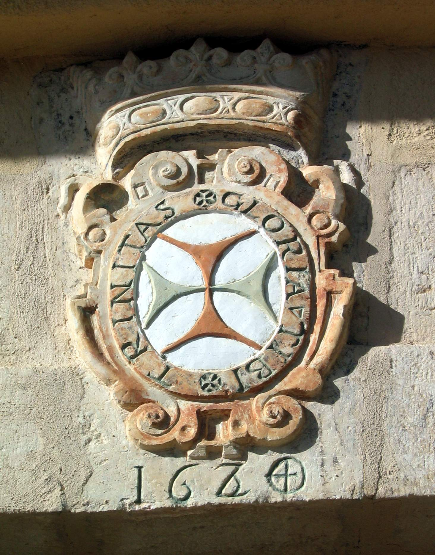 Detalle de escudo con la cruz trinitaria en el frontis de la fachada meridional del Monasterio de Tejeda, Garaballa (Cuenca), año 2014.